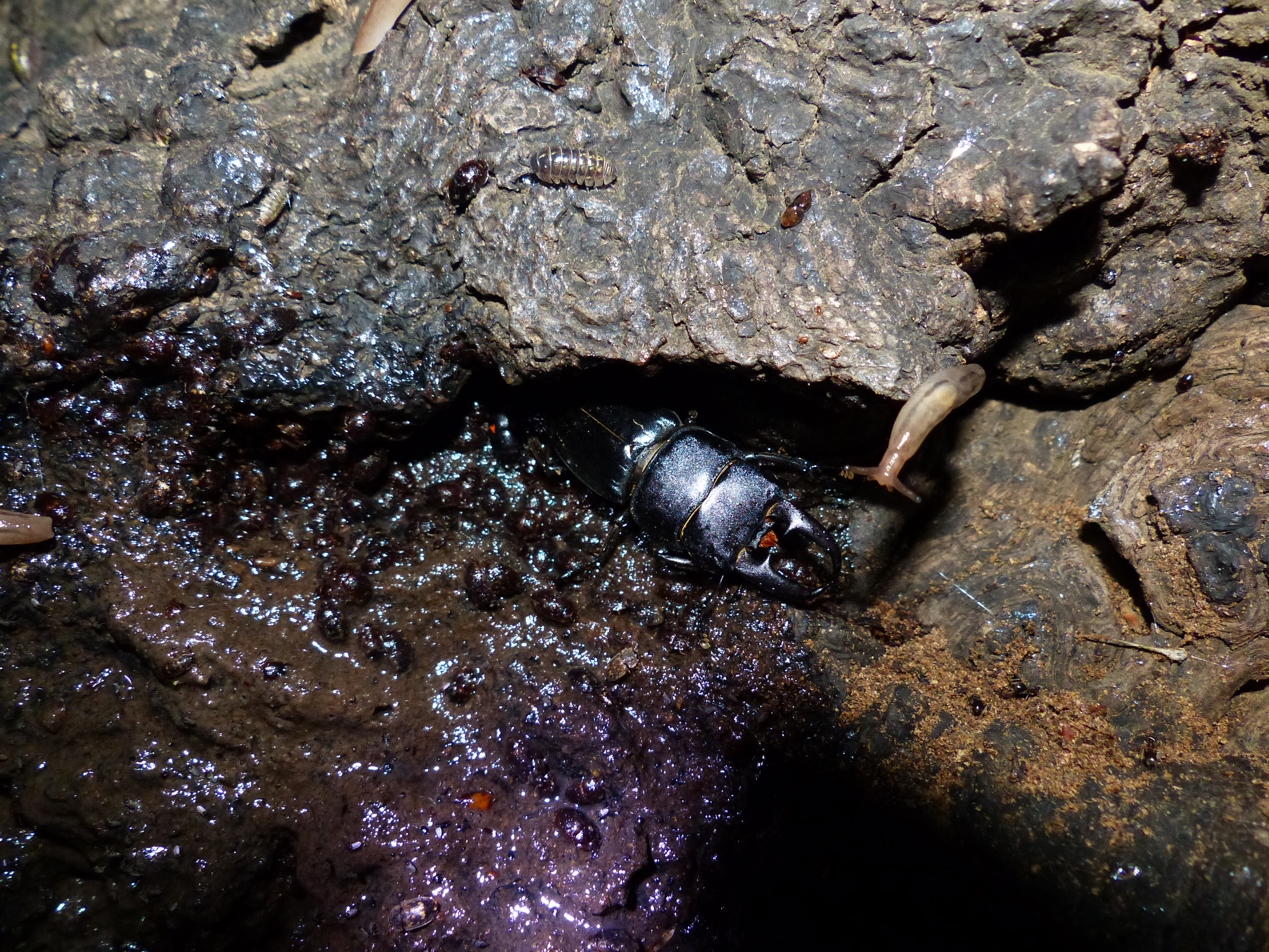 ナメクジやゴキブリと一緒にいることが多い